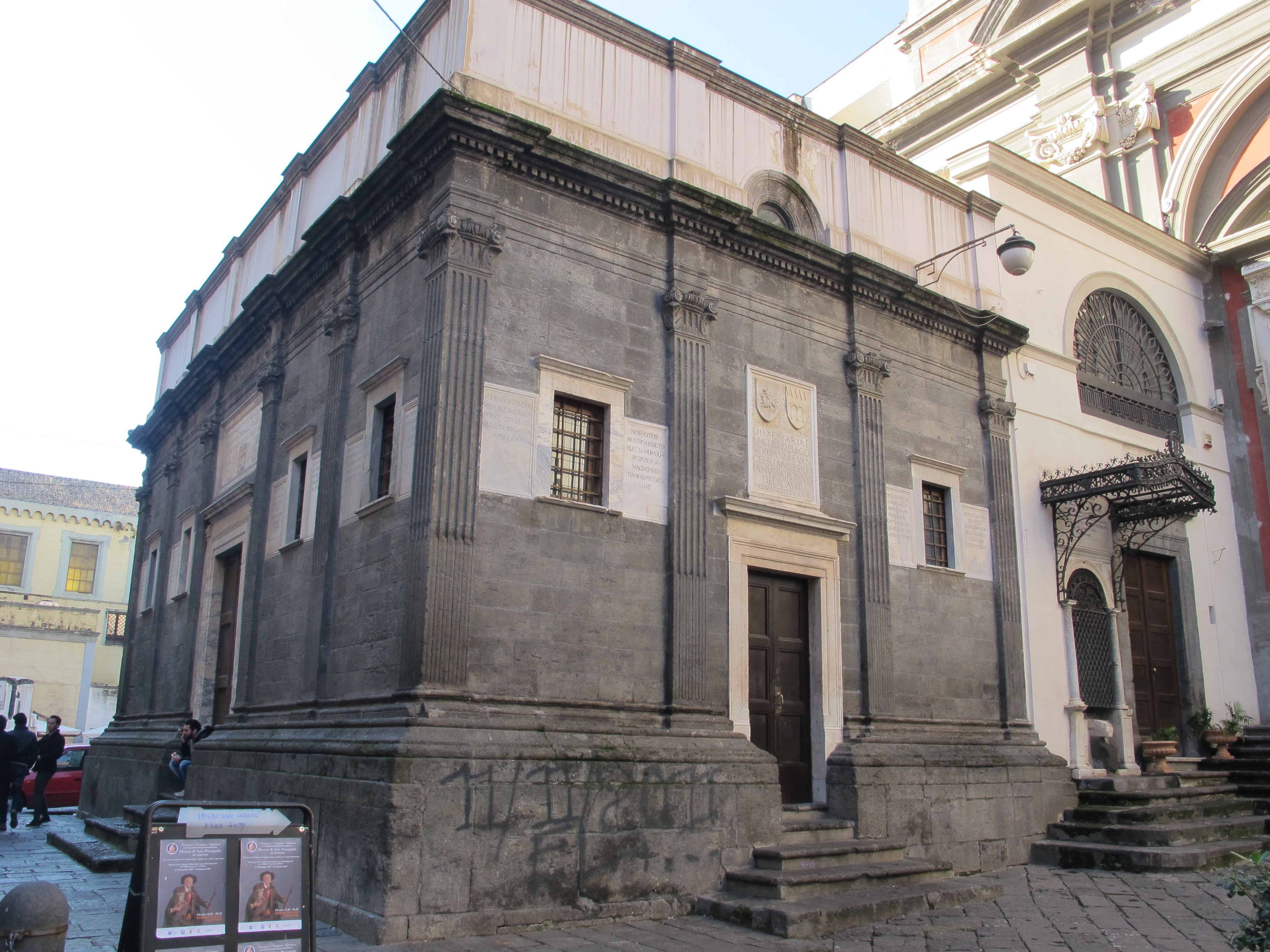 Napoli